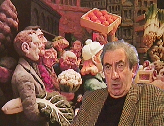 Portrait de Raymond Mason